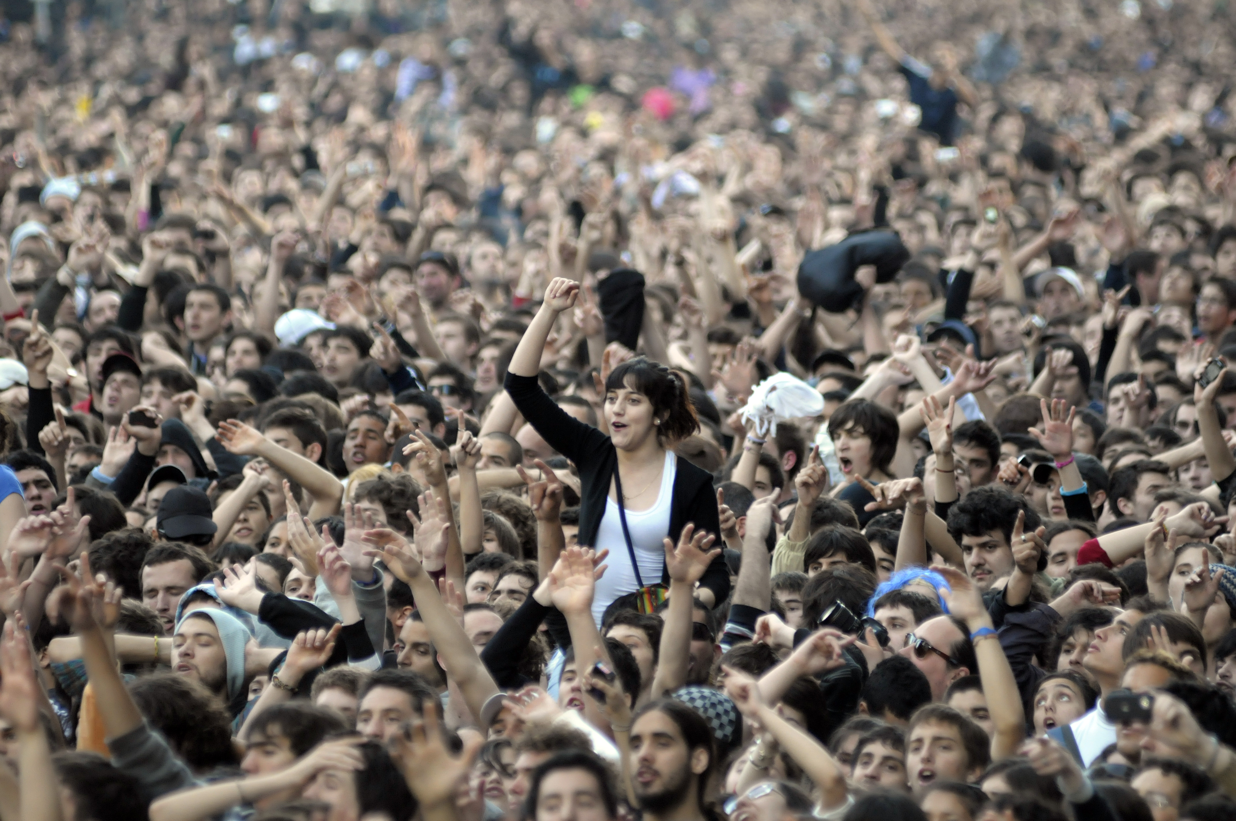 Fotografía de uno de los escenarios en los festejos centrales de las actividades conmemorativas del Bicentenario de Uruguay. El día 10 de octubre de 2011 se realizaron distintas actividades en el centro de Montevideo. Se instalaron escenarios donde distintos artistas brindaron espectáculos. La jornada conmemorativa se extendió hasta la madrugada del día 11 de octubre. Esta fotografía fue tomada por Matilde Campodonico. Mail